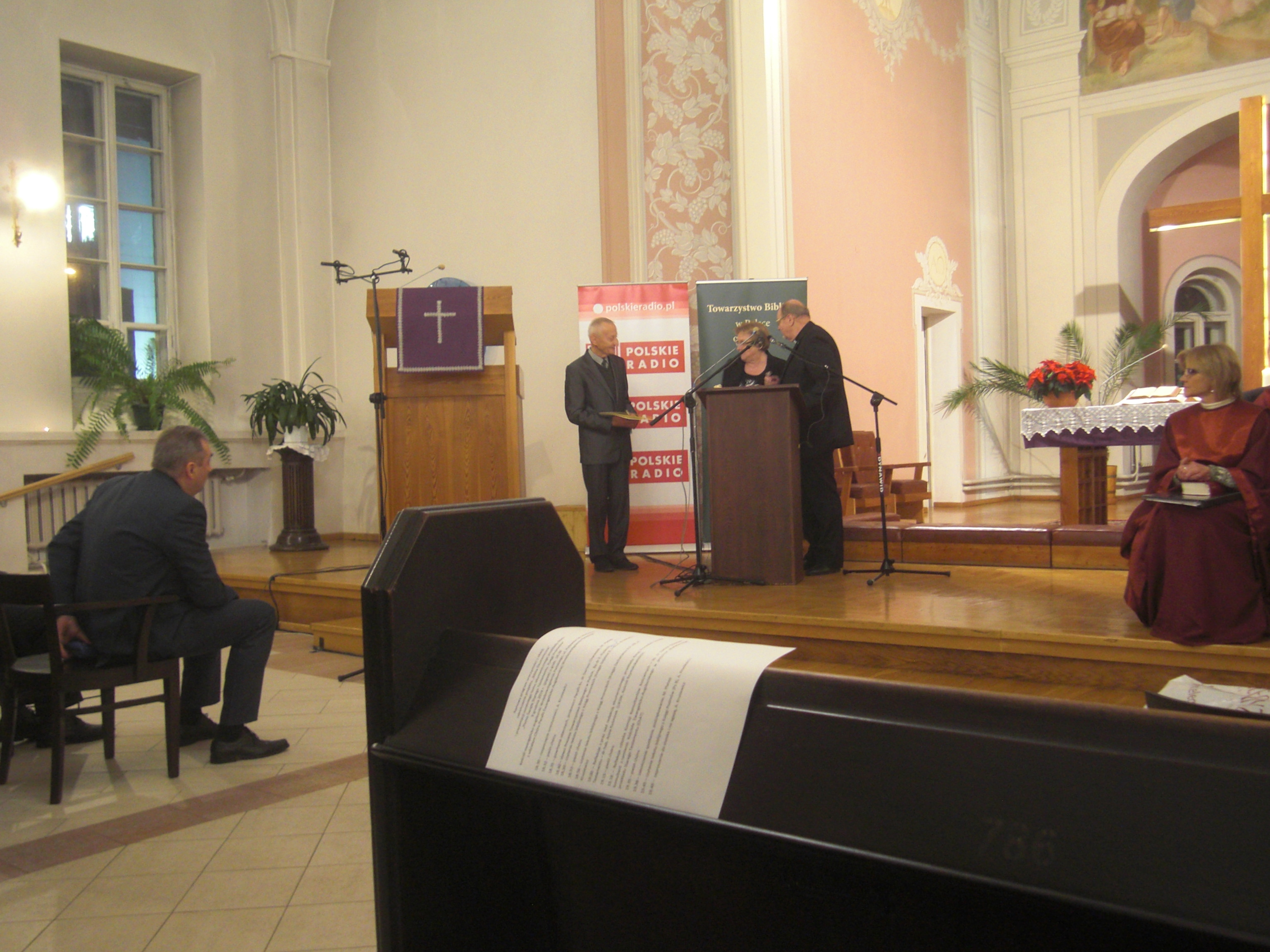 Prezentacja Ksiąg Prorockich